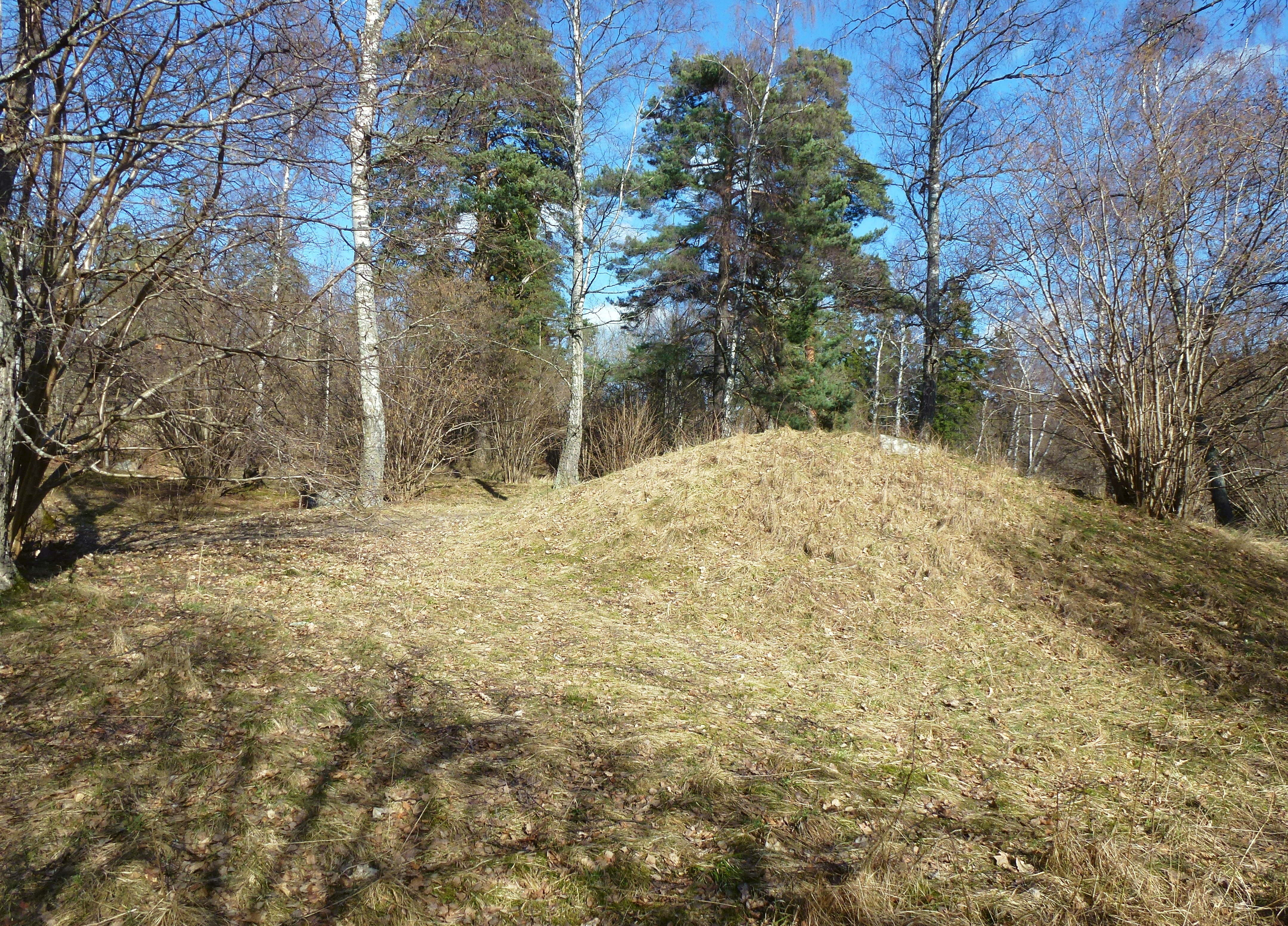 Edsängens gravfält, Sollentuna kommun